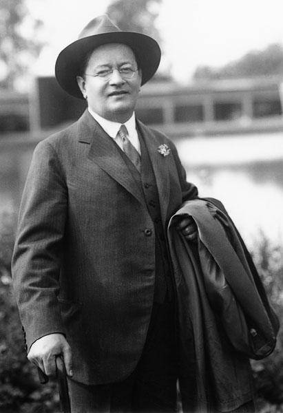 Cyrillus Johansson 1929 i Karlstad